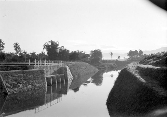 Negatief. Afgedamde rivier (Kali Majong, Renes bij Djember), links de inlaat naar het kanaal, Dampar